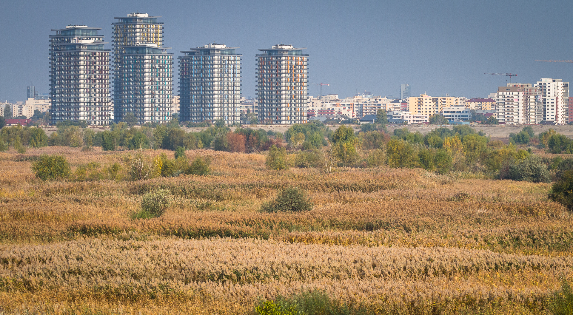 Delta Vacaresti, Lacul Vacaresti, Bucuresti